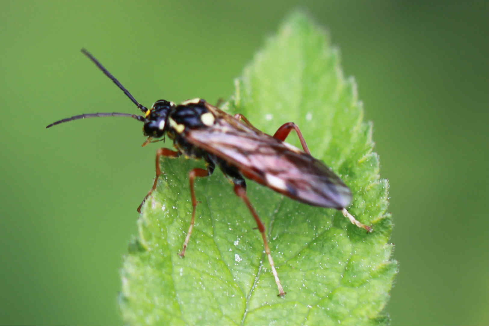 Tenthredopsis stigma am 11.5.2017 in der Schwetzinger Hardt